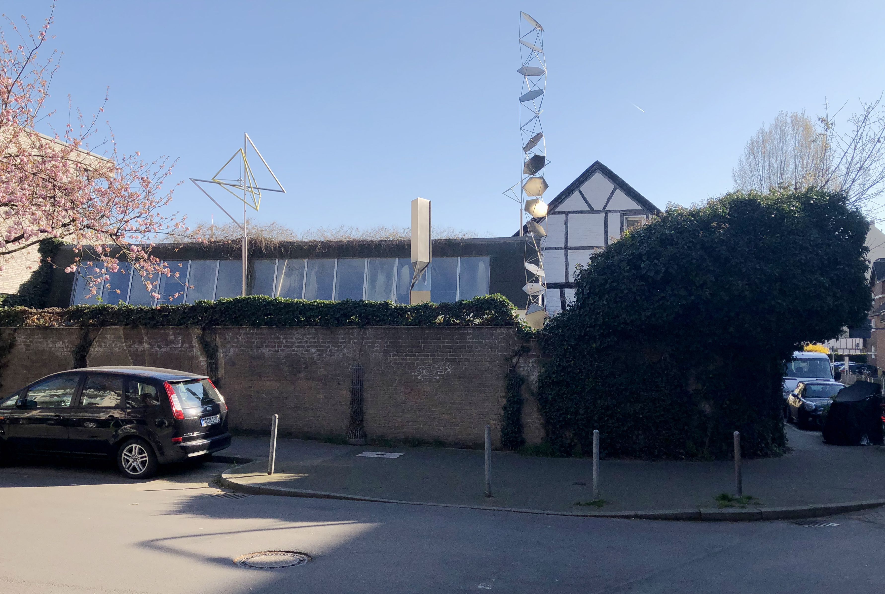 Oberkasseler Straße 62 Ecke Salierstraße, Düsseldorf-Oberkassel mit Sicht auf das Atelierhaus des Künstlerpaars Karl-Ludwig Schmaltz und Gabriele Grosse